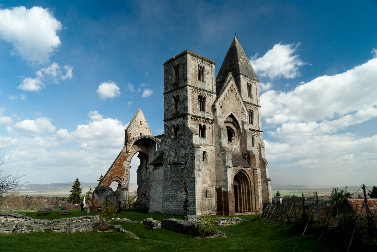 Premontrei prépostsági templom romja (Zsámbék, Régi templom u.) This is a photo of a monument in Hungary, Identifier: 7623